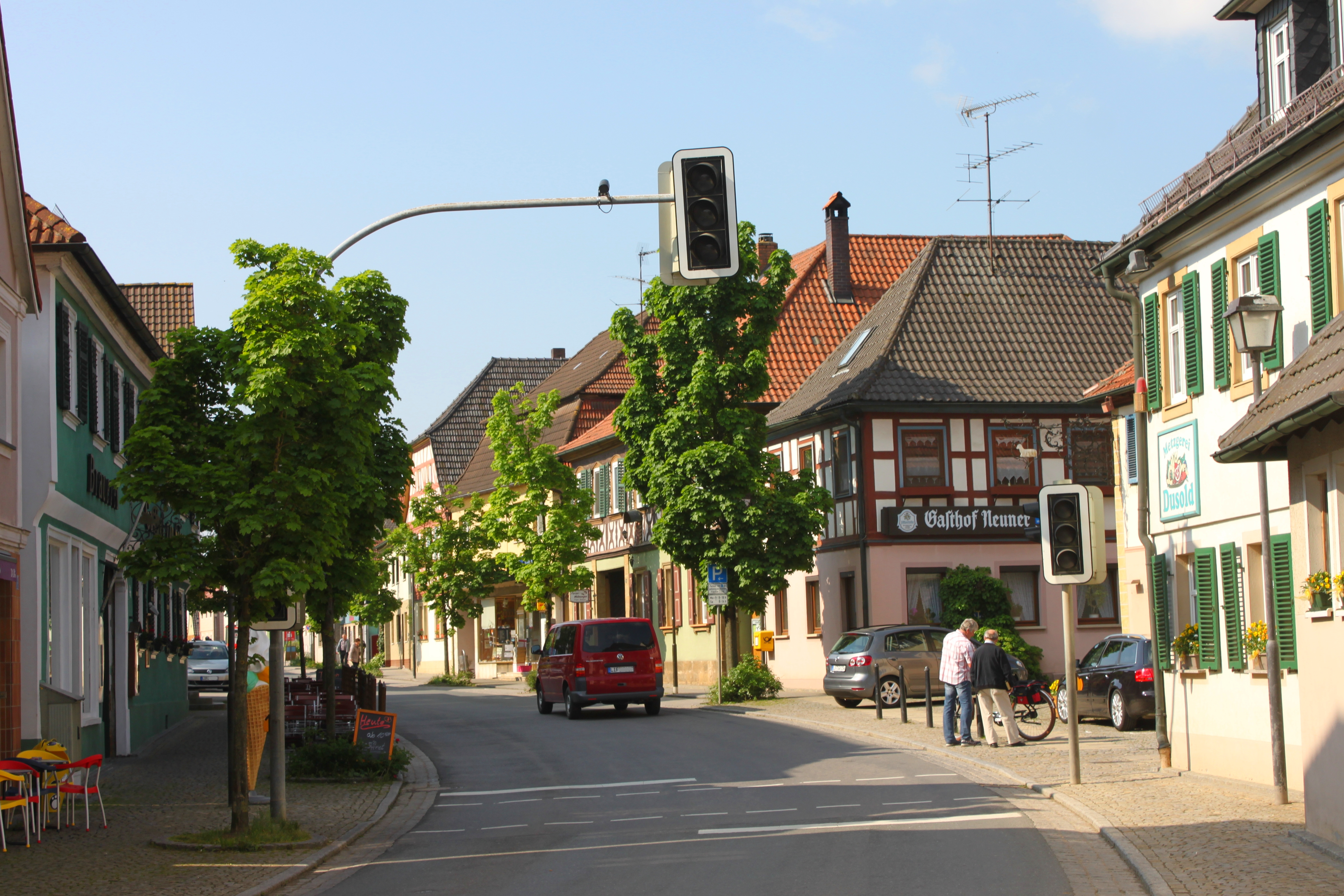 Blick in die Hauptstraße in Ebensfeld